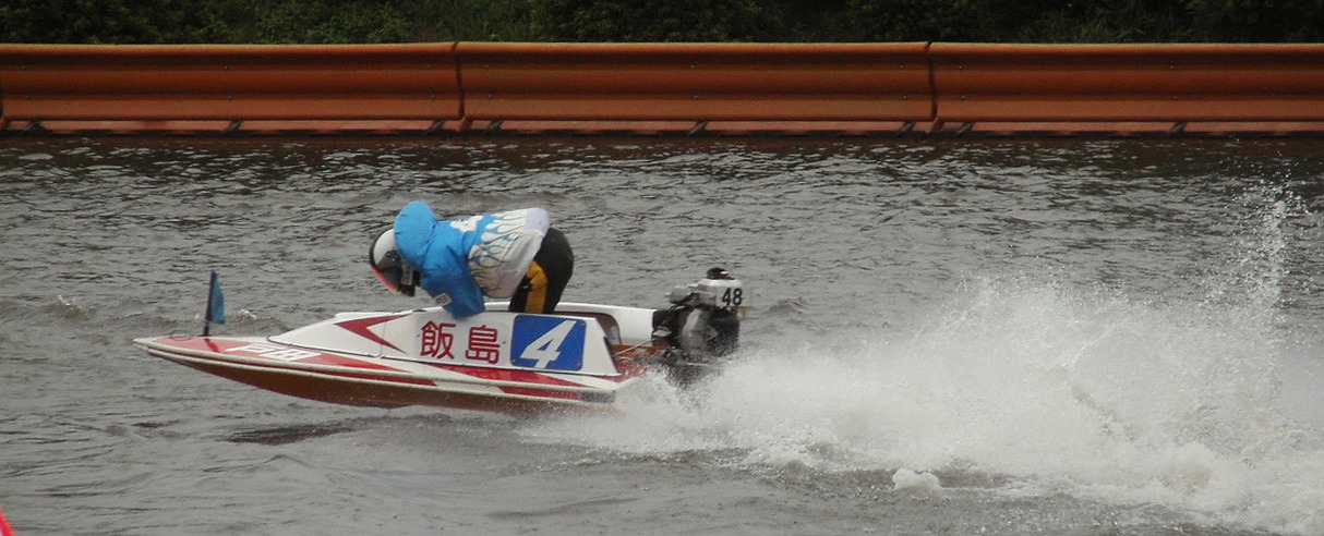 Kyotei Racer, Kyotei-Rennfahrer